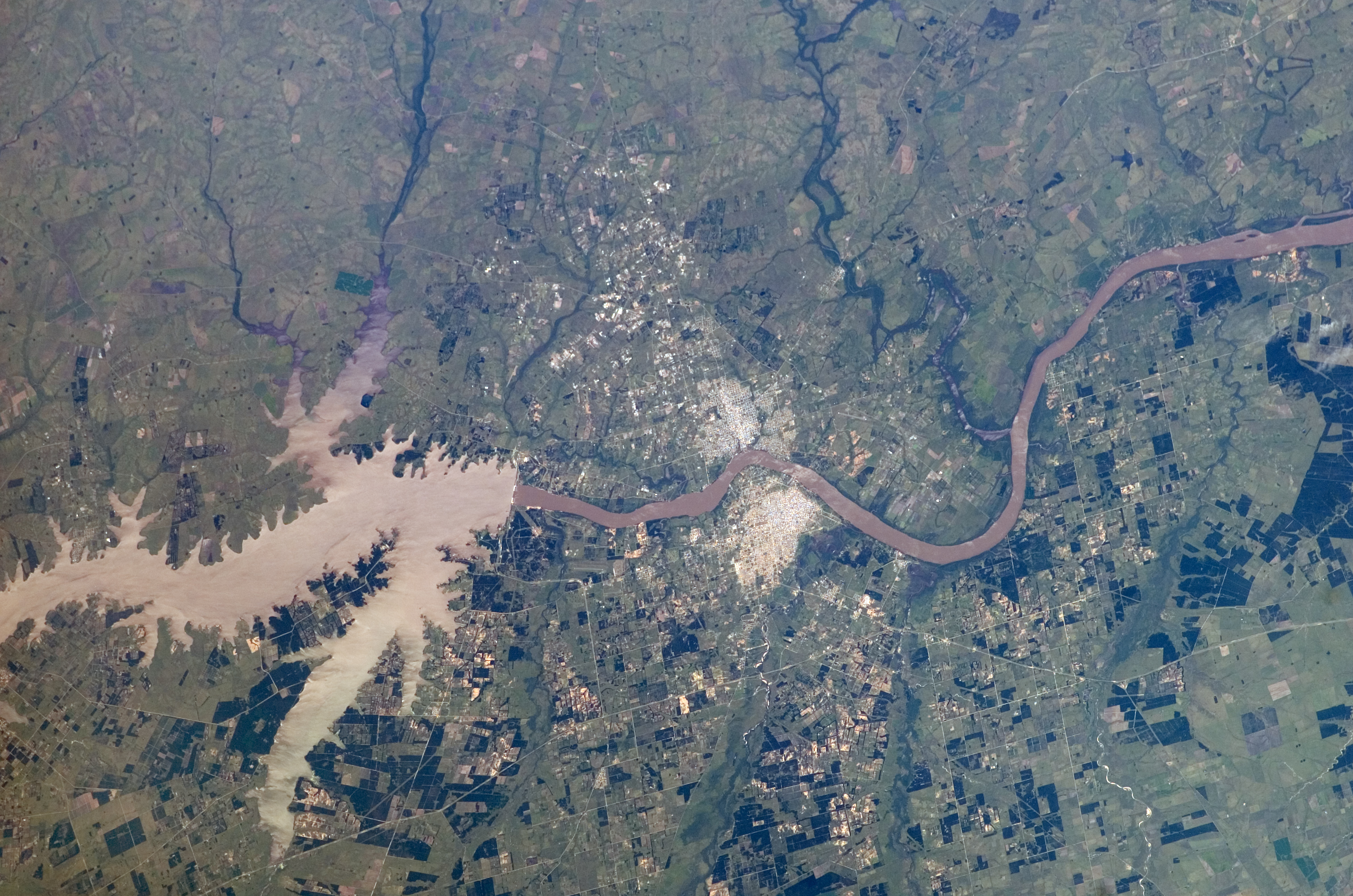 Lago formado por la Represa Salto Grande, ubicada en el curso del Río Uruguay. Aguas abajo se aprecia la ciudad uruguaya de Salto, en la margen izquierda, y la ciudad argentina de Concordia, en la margen derecha. El río fluye de norte a sur (izquierda a derecha en la foto). Fuente: NASA Categoría:América del Sur (imagen)